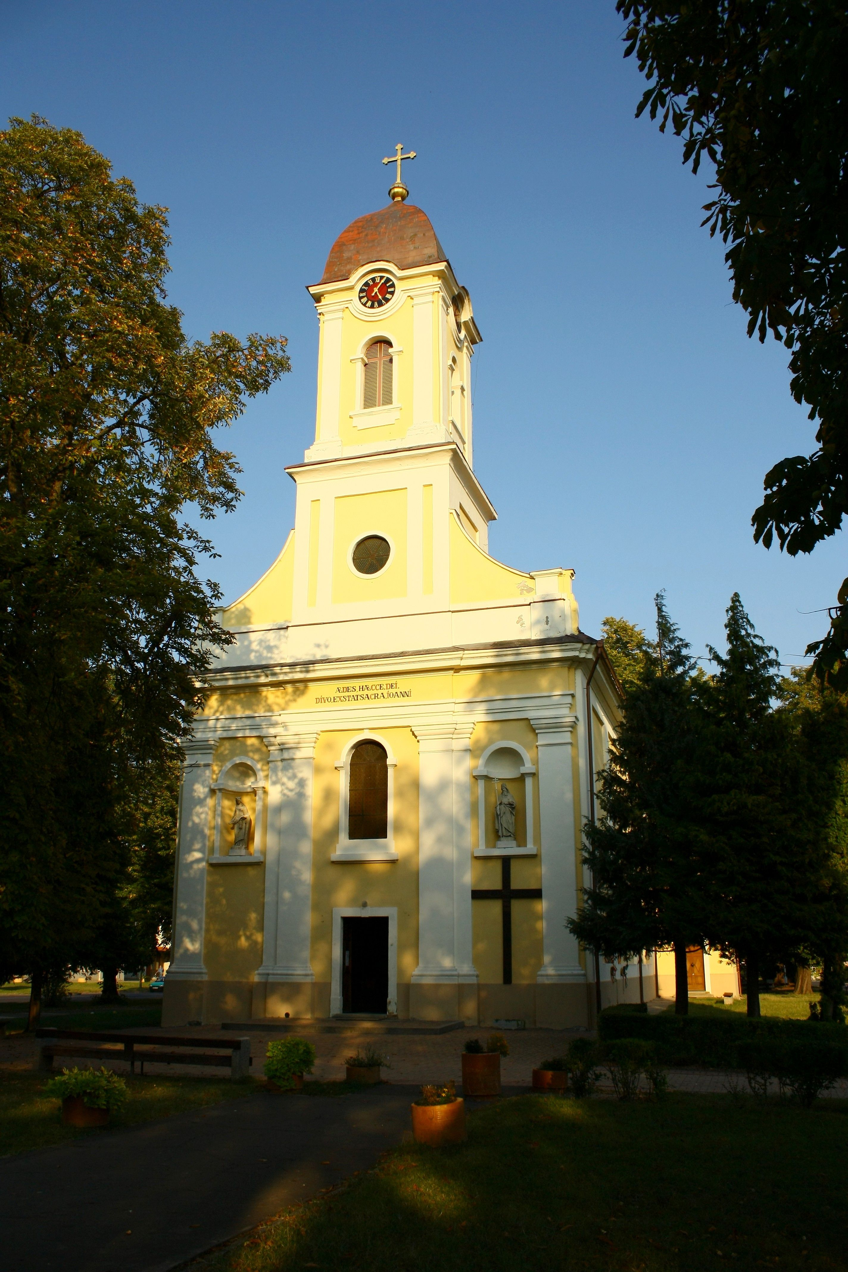 Krisztus király római katolikus templom (Barcs, Hősök tere 3.)